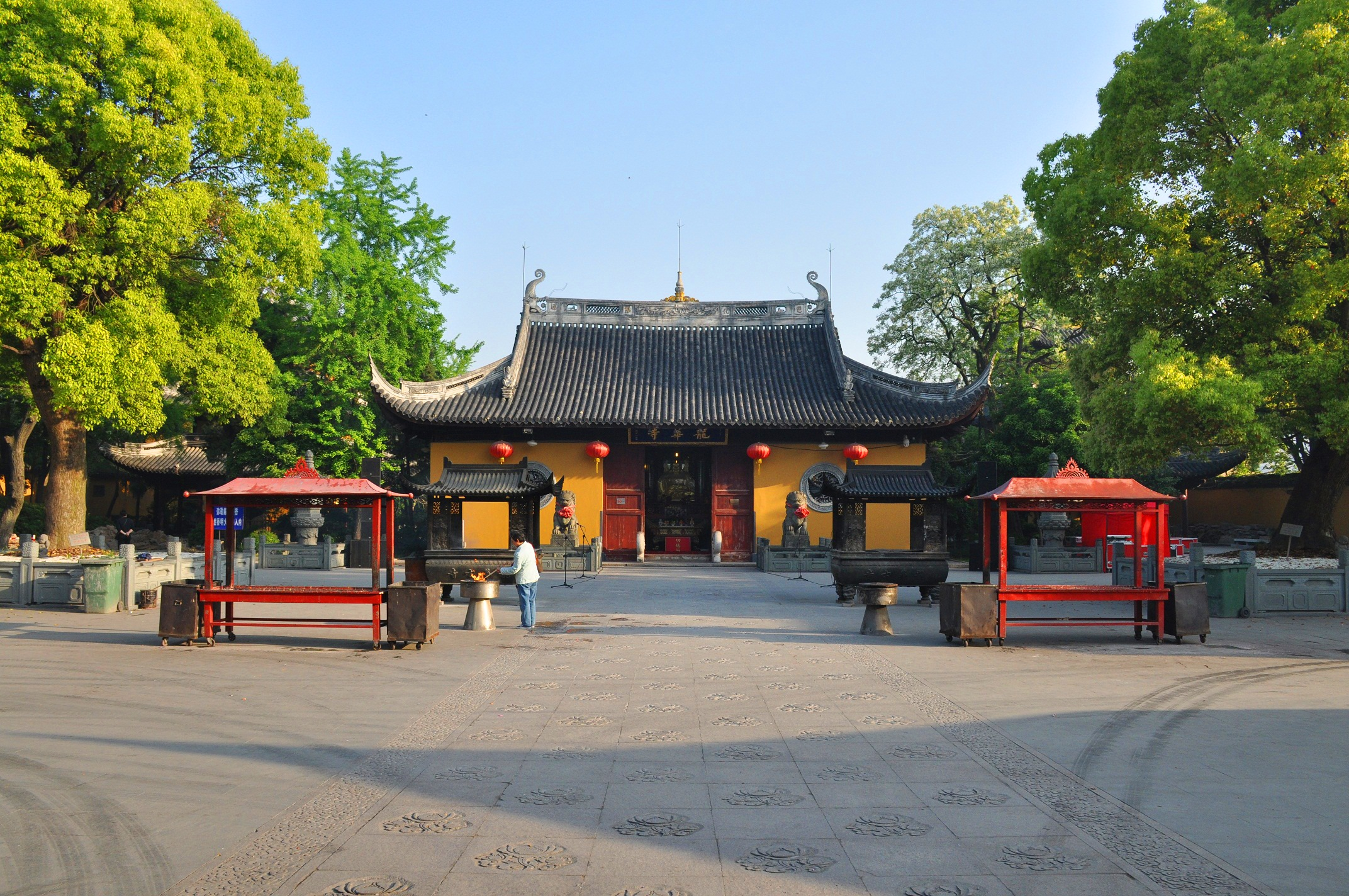 龙华寺 龙华路2853号 清